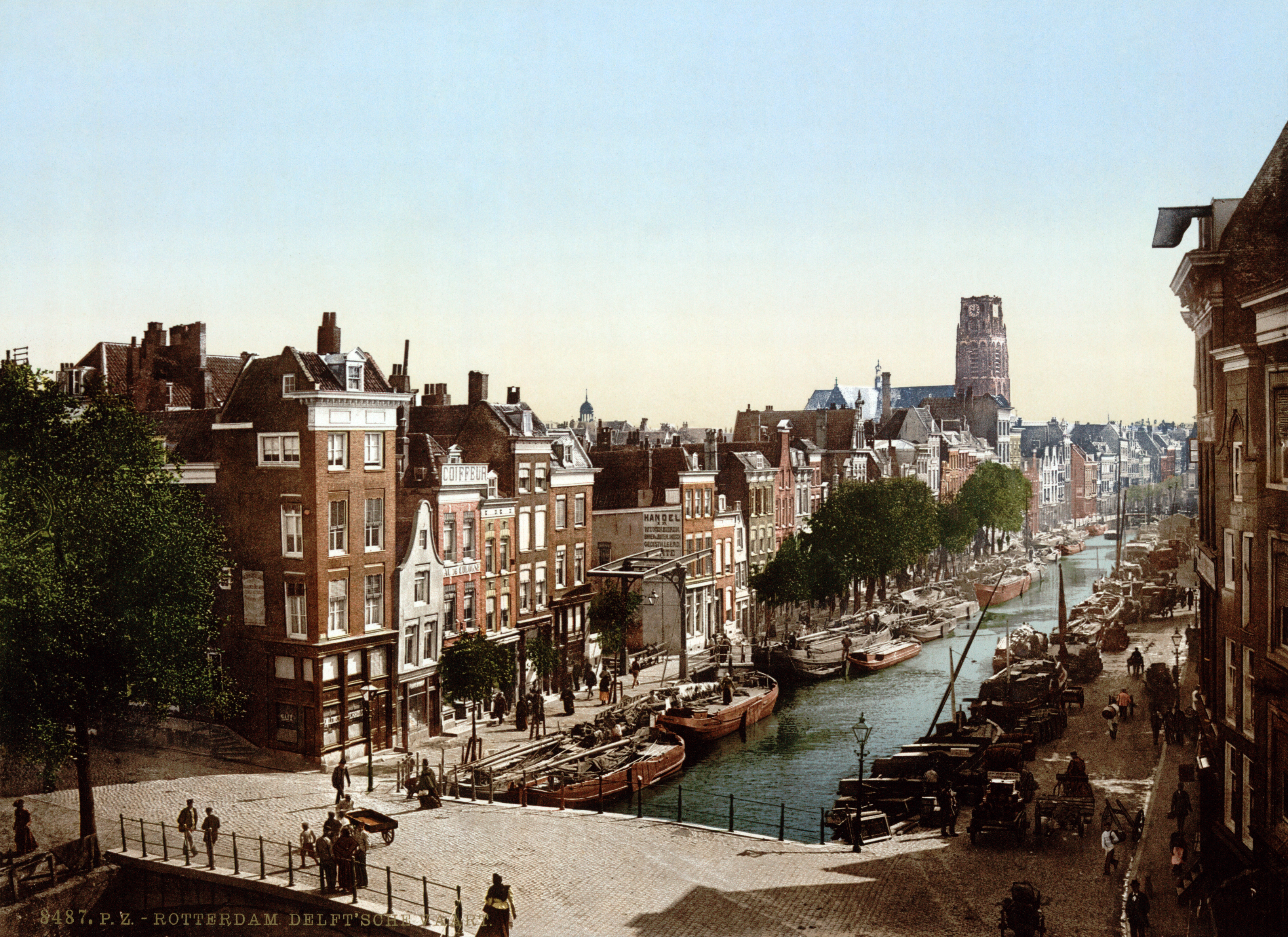 Delft Vaart [Delftsevaart], Rotterdam, The Netherlands